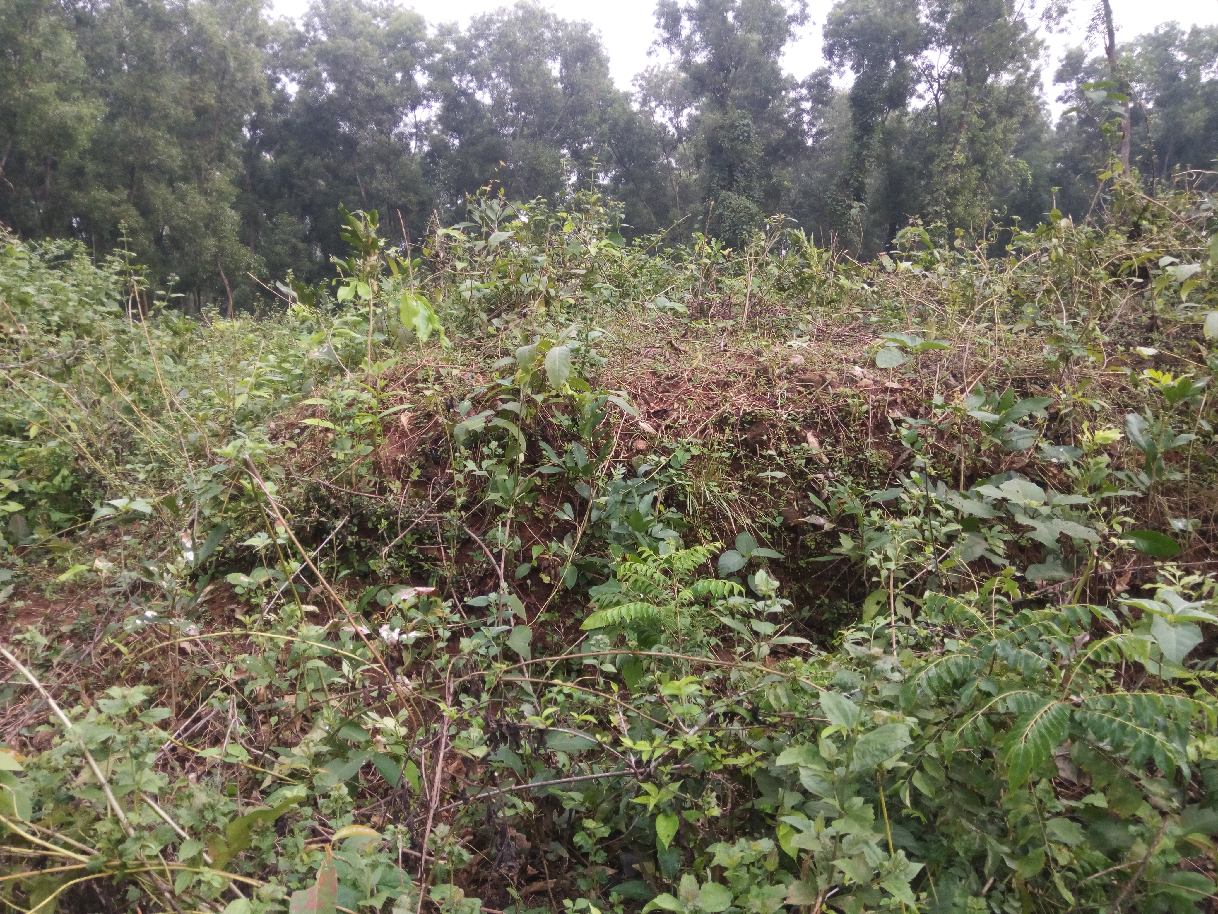 চাপড়াকোট ঢিবি